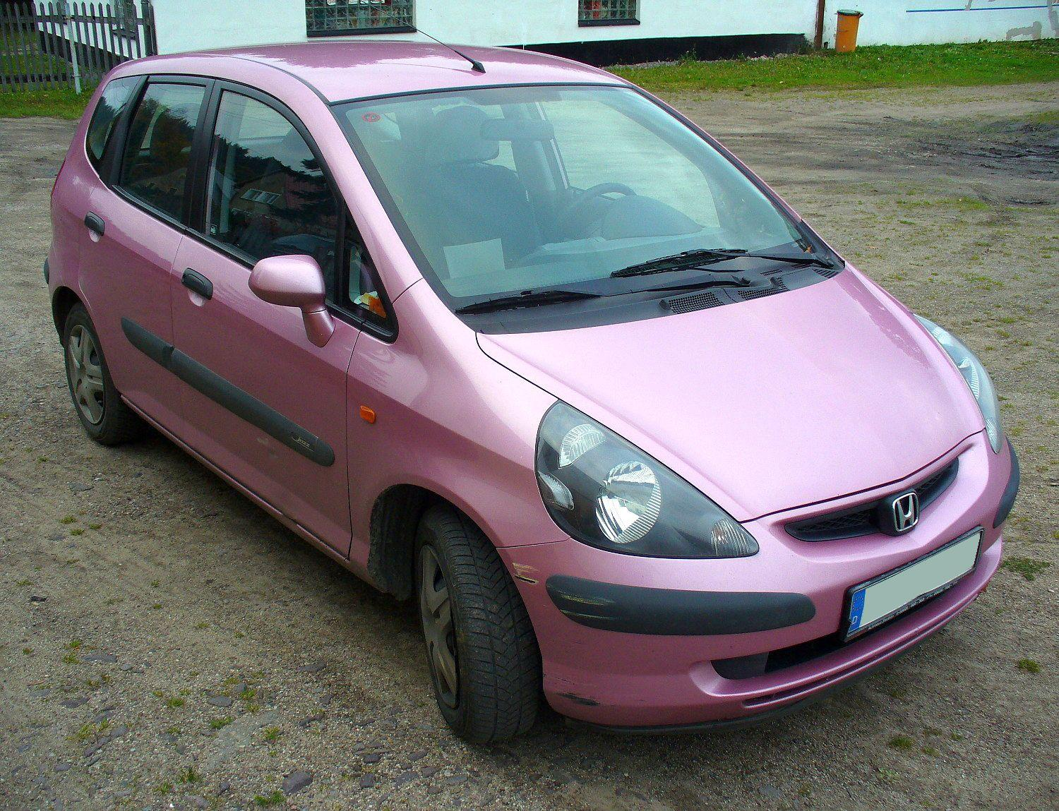 Honda Jazz